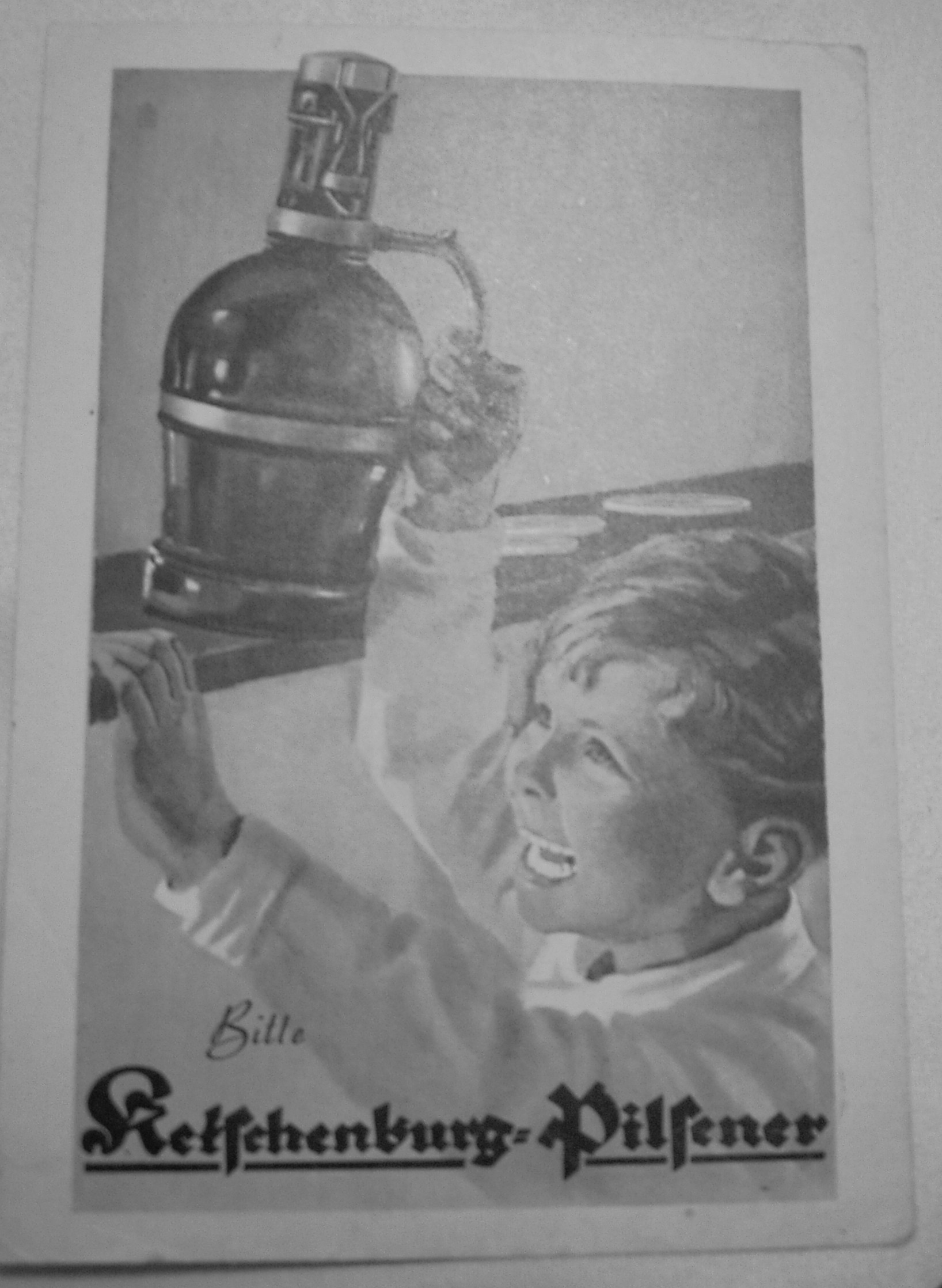 Fotografie einer Werbepostkarte von ca. 1920 der 1985 aufgelösten Brauerei Ketschenburg in Stolberg Rhld.